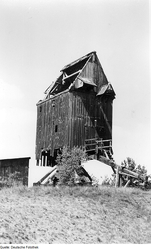 Original image description from the Deutsche Fotothek Altmersleben. Bockmühle, ruinös